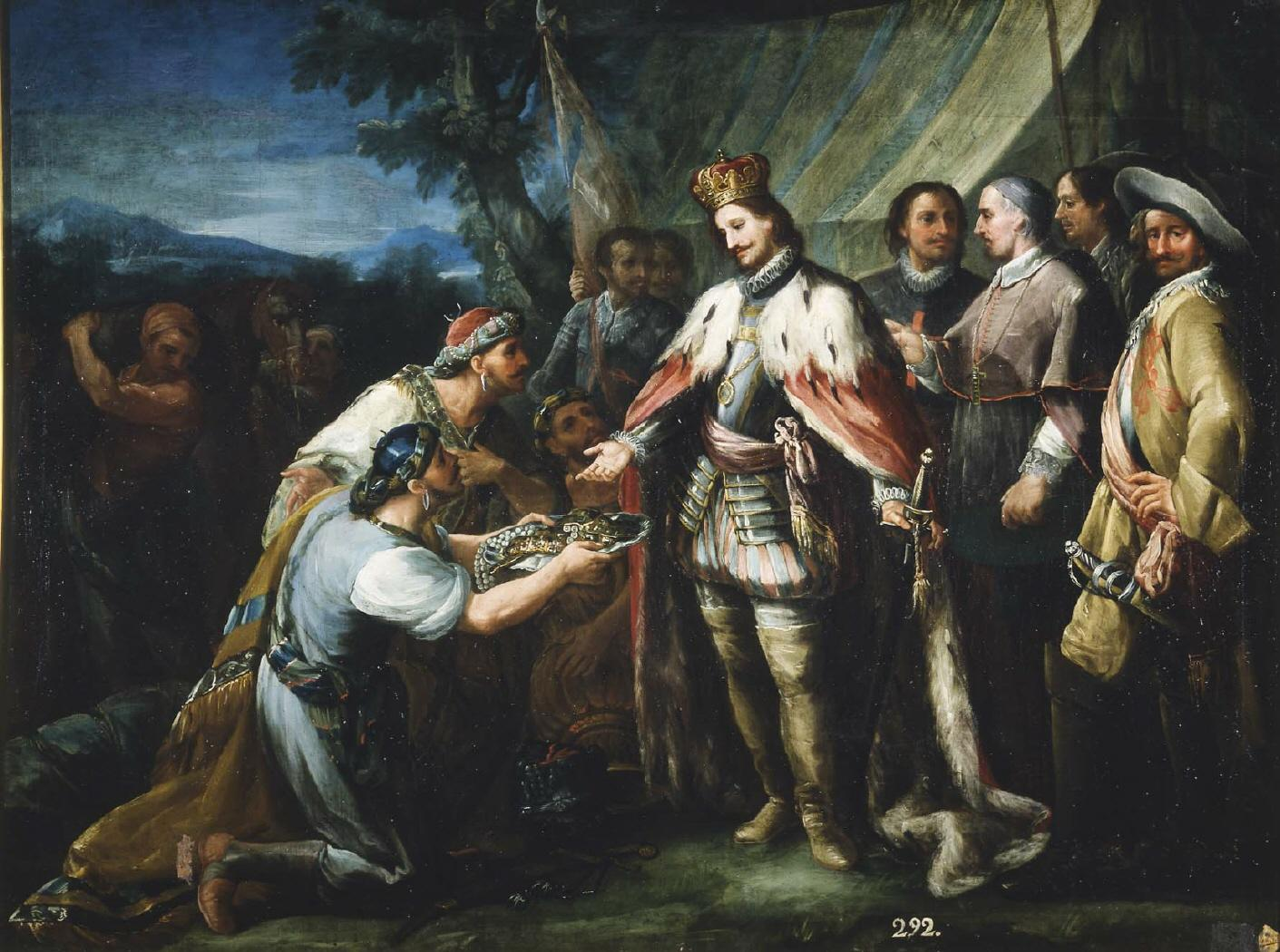 La obra representa al rey Fernando III de Castilla, que fue canonizado en 1671, recibiendo el tributo de Mahomad de Baeza.